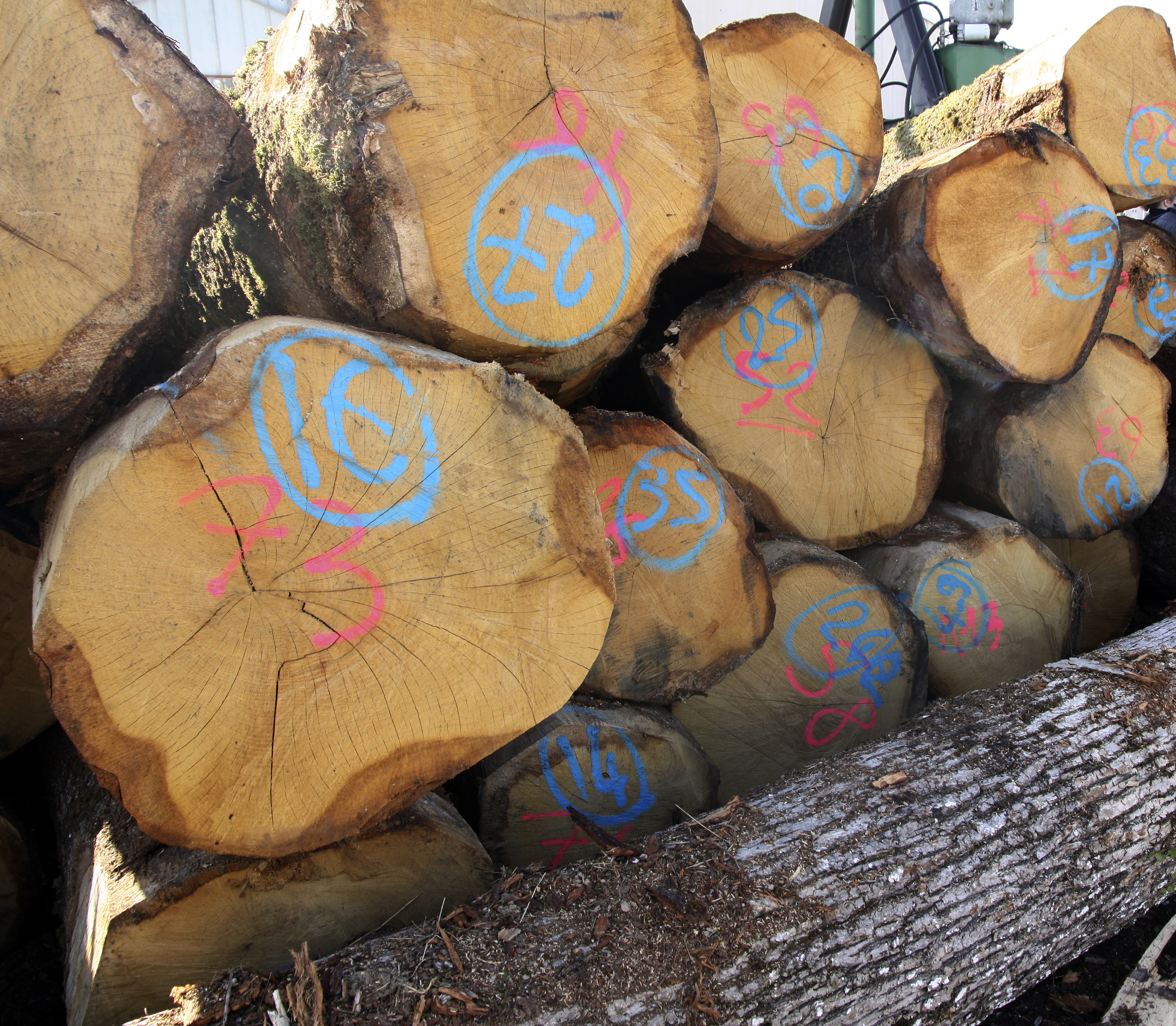 Troncs de chêne sélectionnés pour la mérranderie